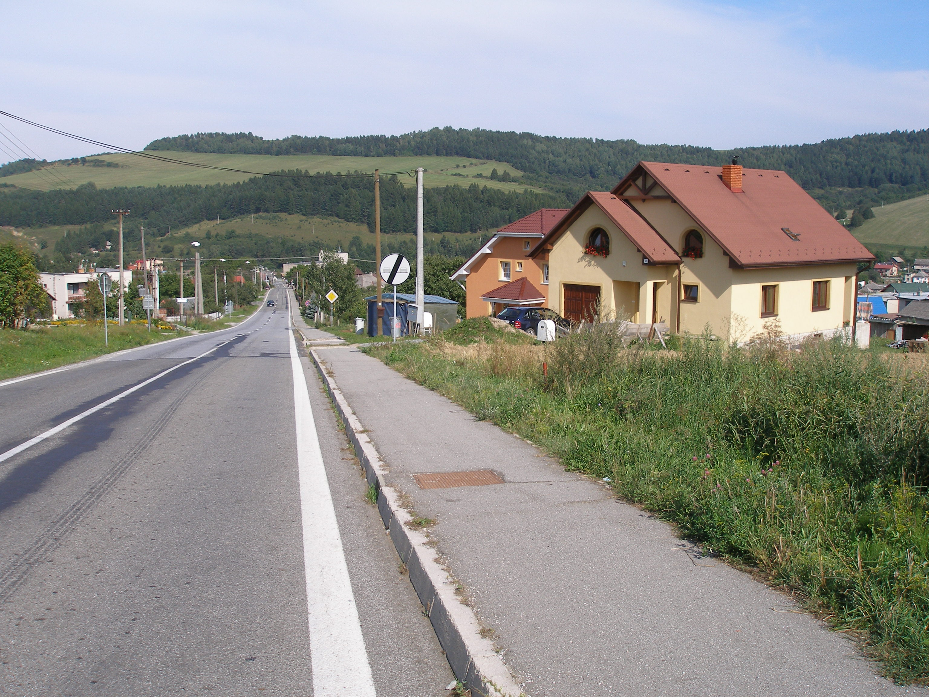 Obec Široké okr.Prešov, región Šariš